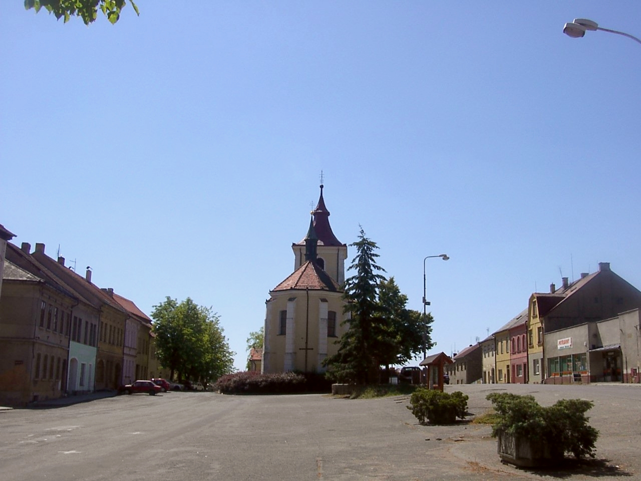 Square in Mýto